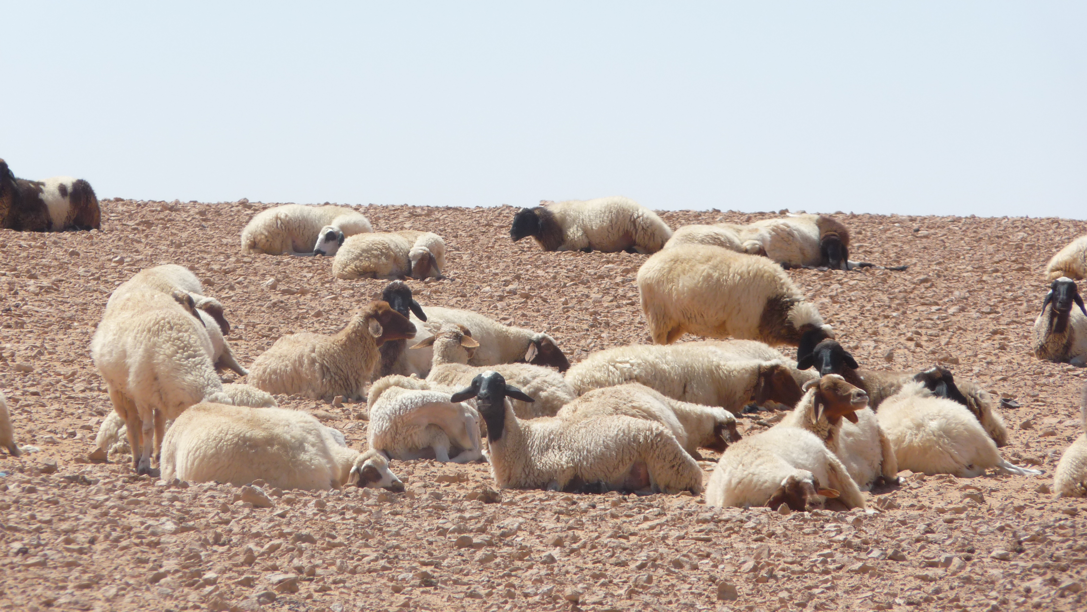 Schafe in Madanin, Tunesien